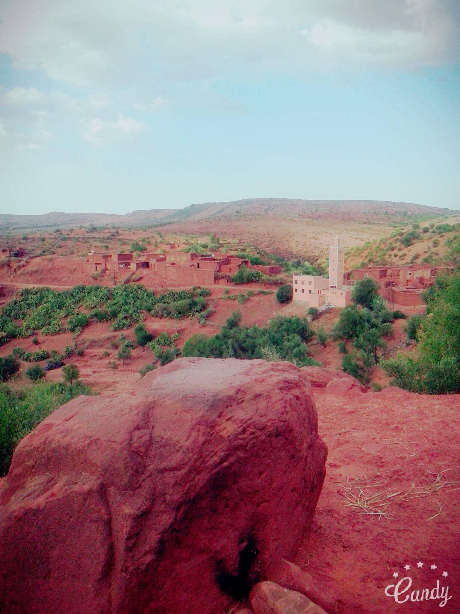 ait hamza